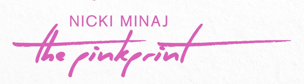 Logotipo, basado en el original, del tercer álbum de la rapera Nicki Minaj.